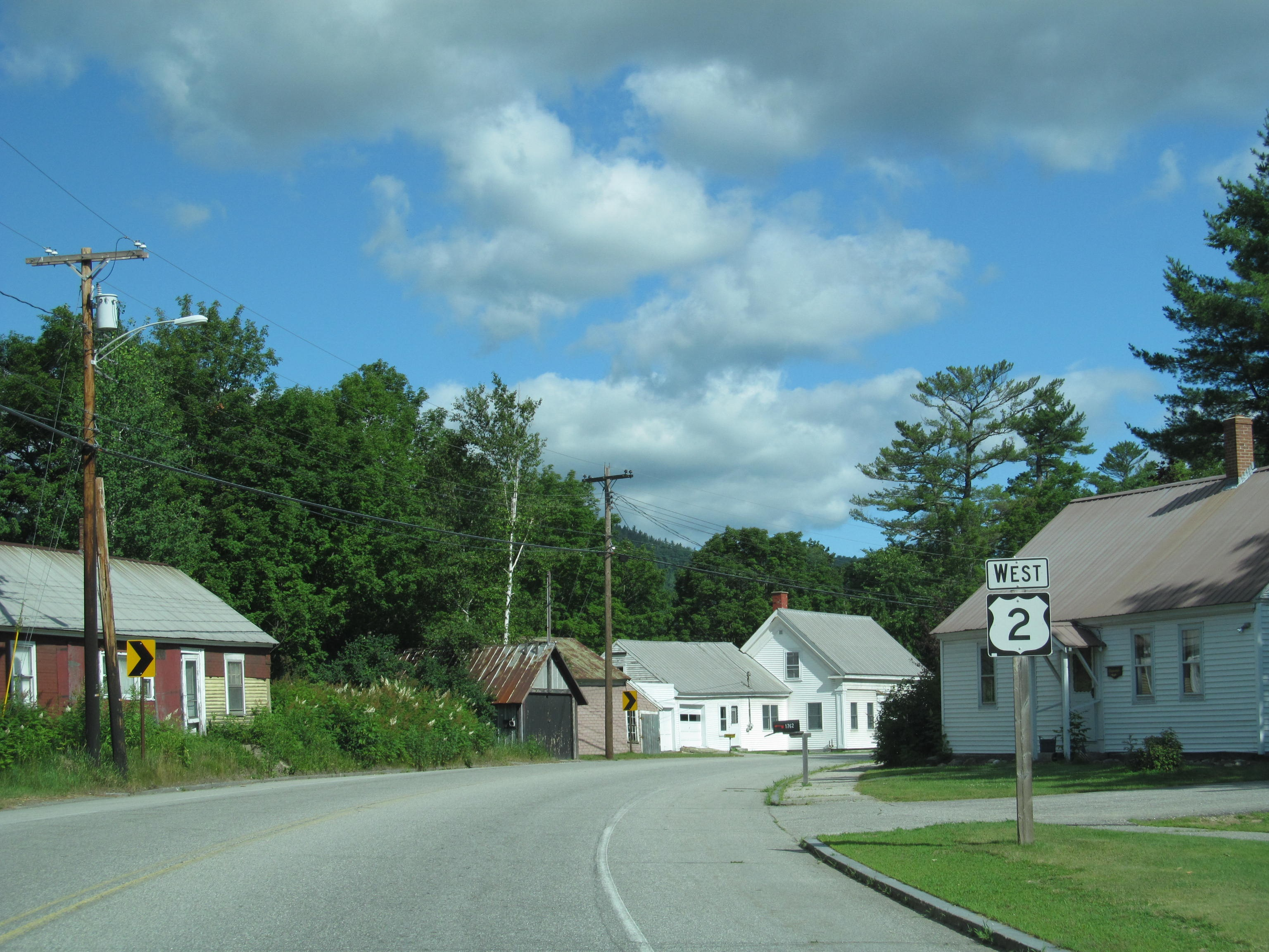 US Route 2 - Maine